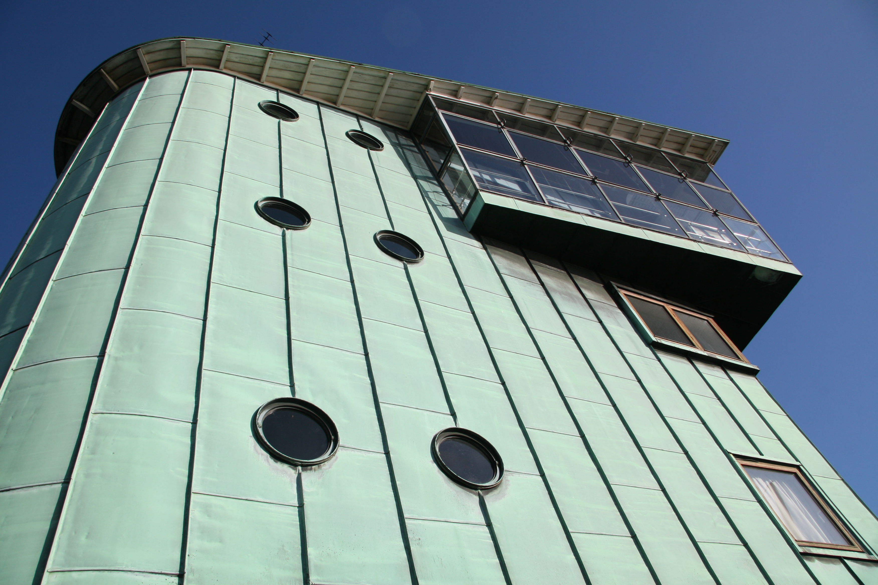 Langebro, Copenhagen, Denmark. Bridge house.